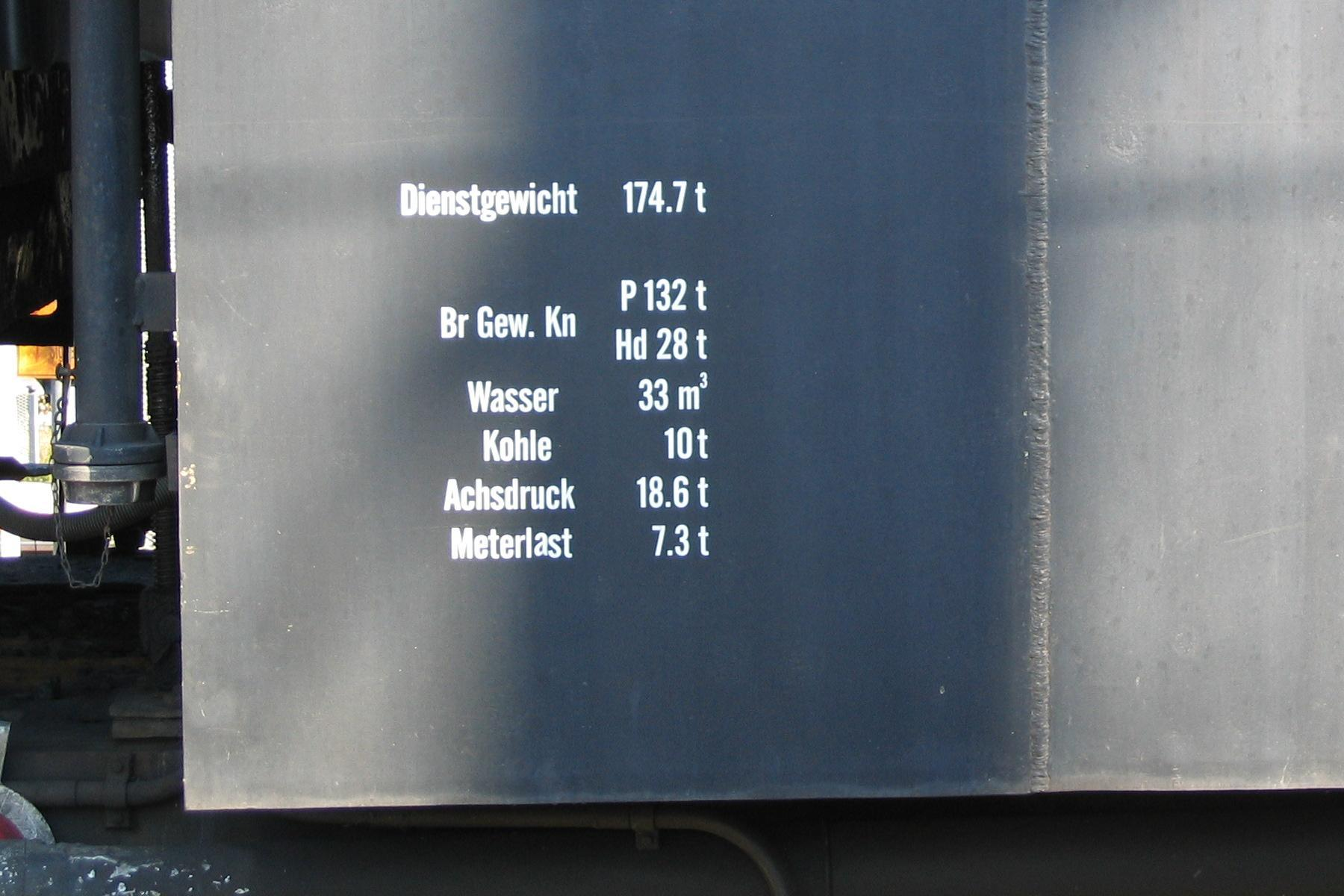 Bremsanschrift an einem Tender